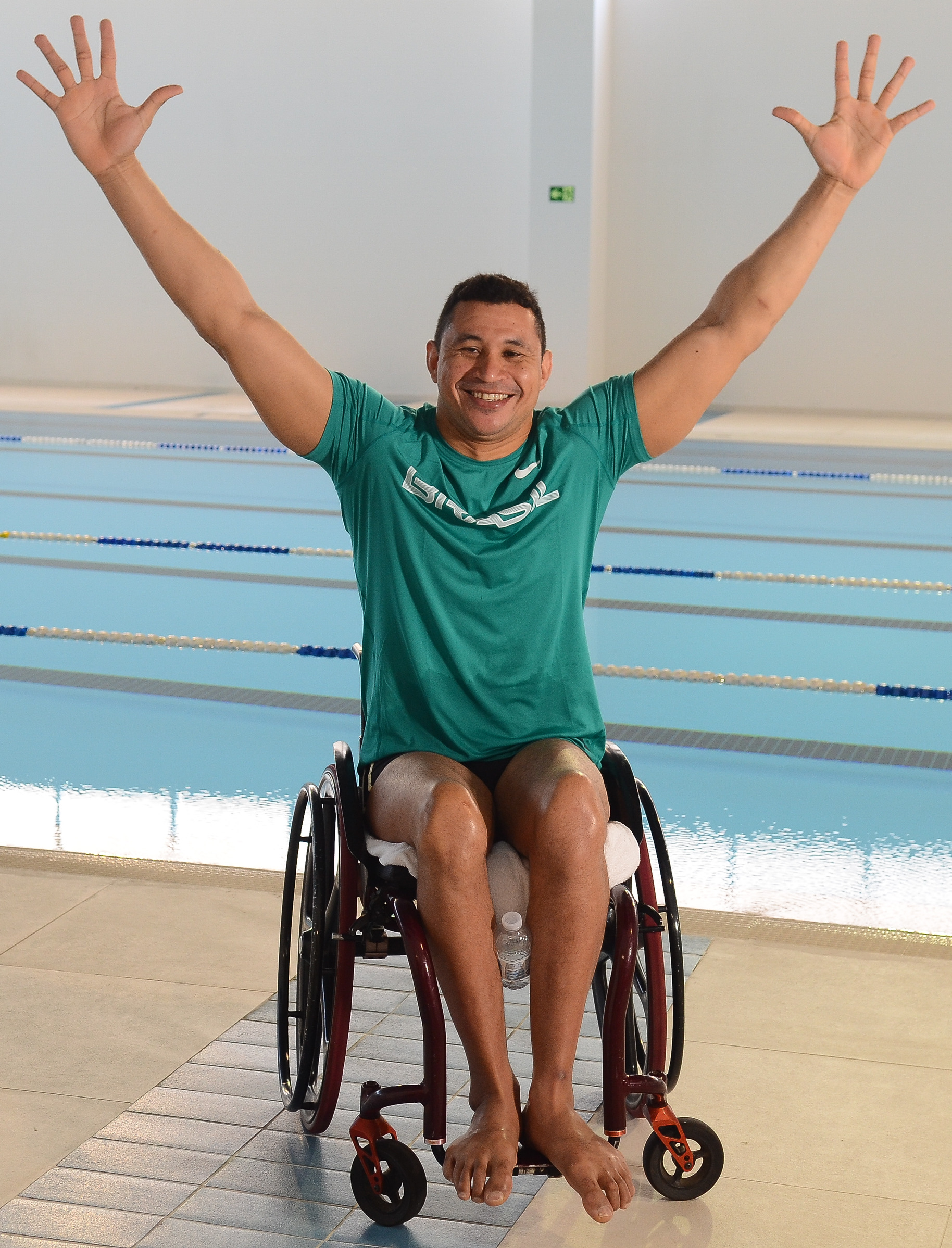 O premiado nadador brasileiro Clodoaldo Silva faz aclimatação no Centro de Treinamento Paralímpico dos Imigrantes, inaugurado recentemente na zona sul de São Paulo